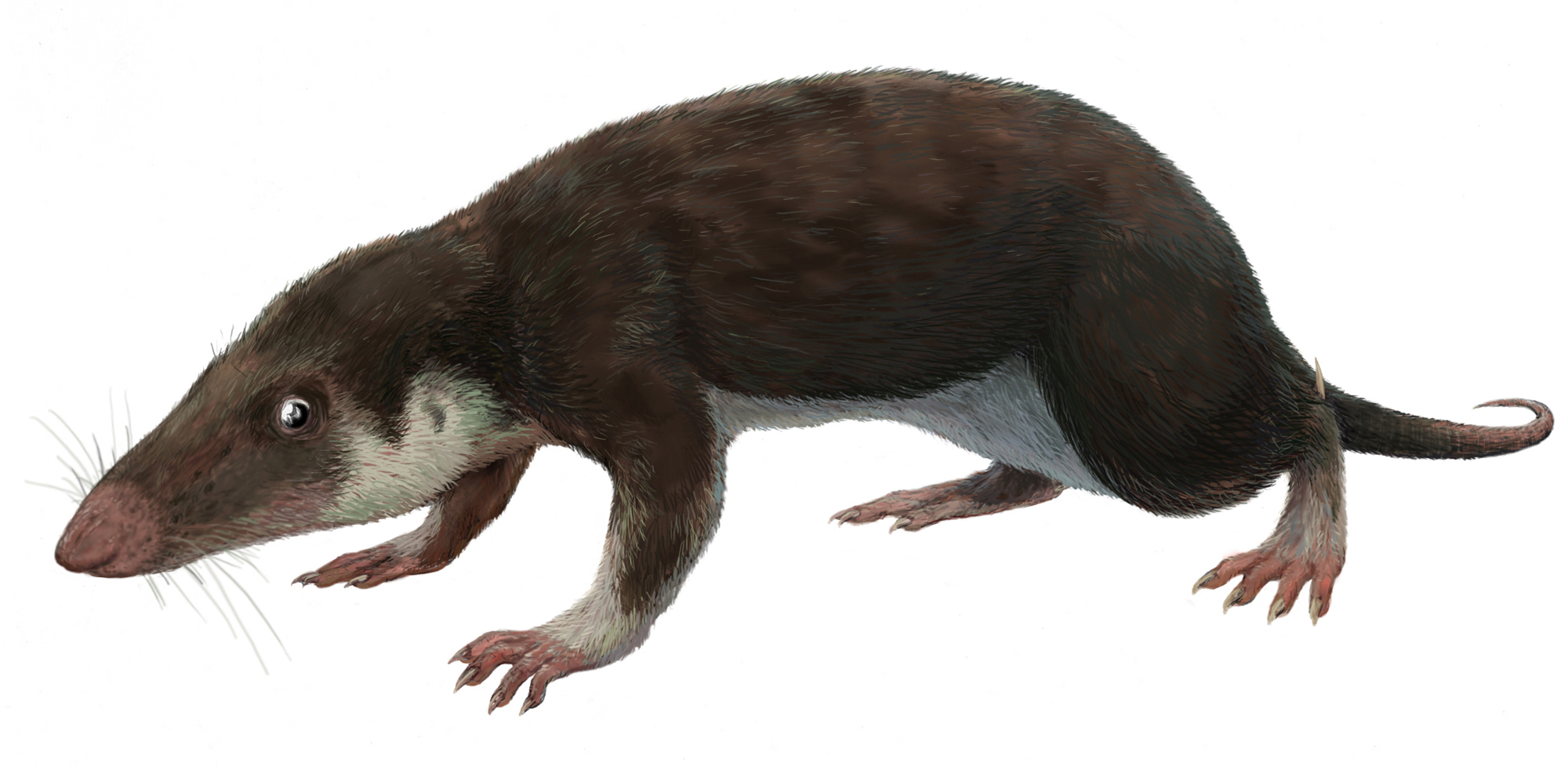 Morganucodon watsoni.